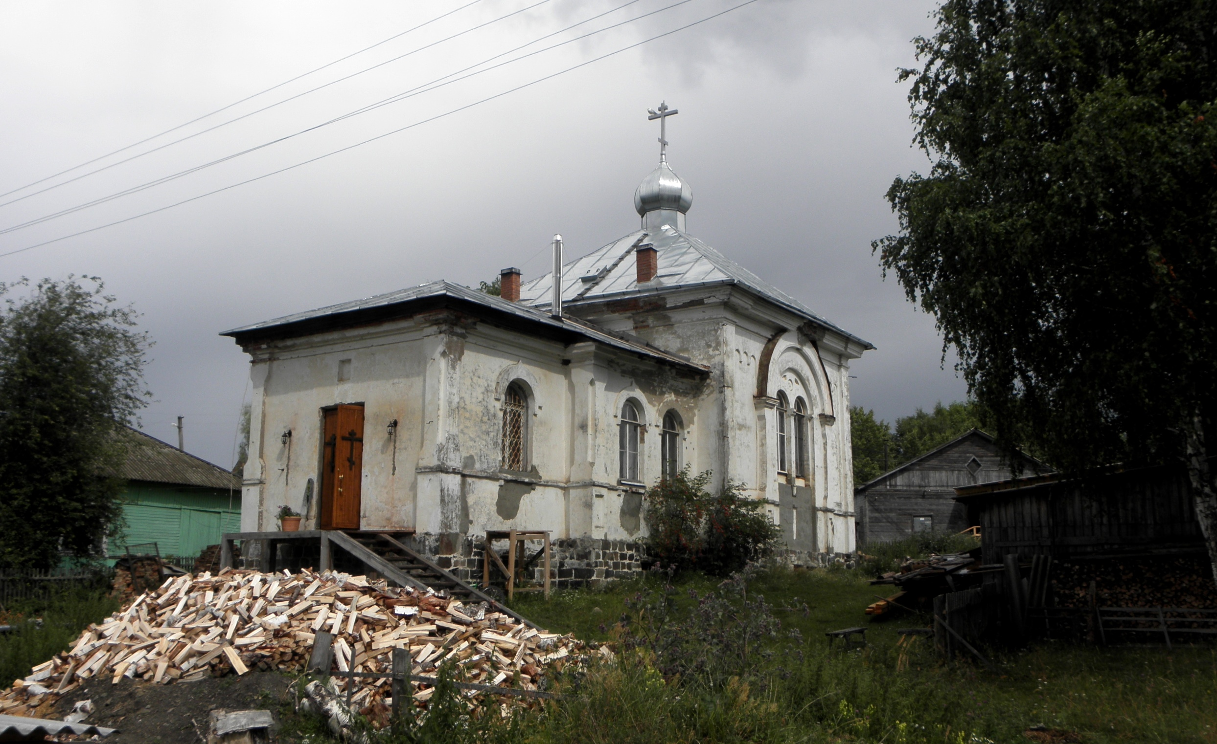 Церковь Алексия, человека Божия: Великая Губа, Карелия